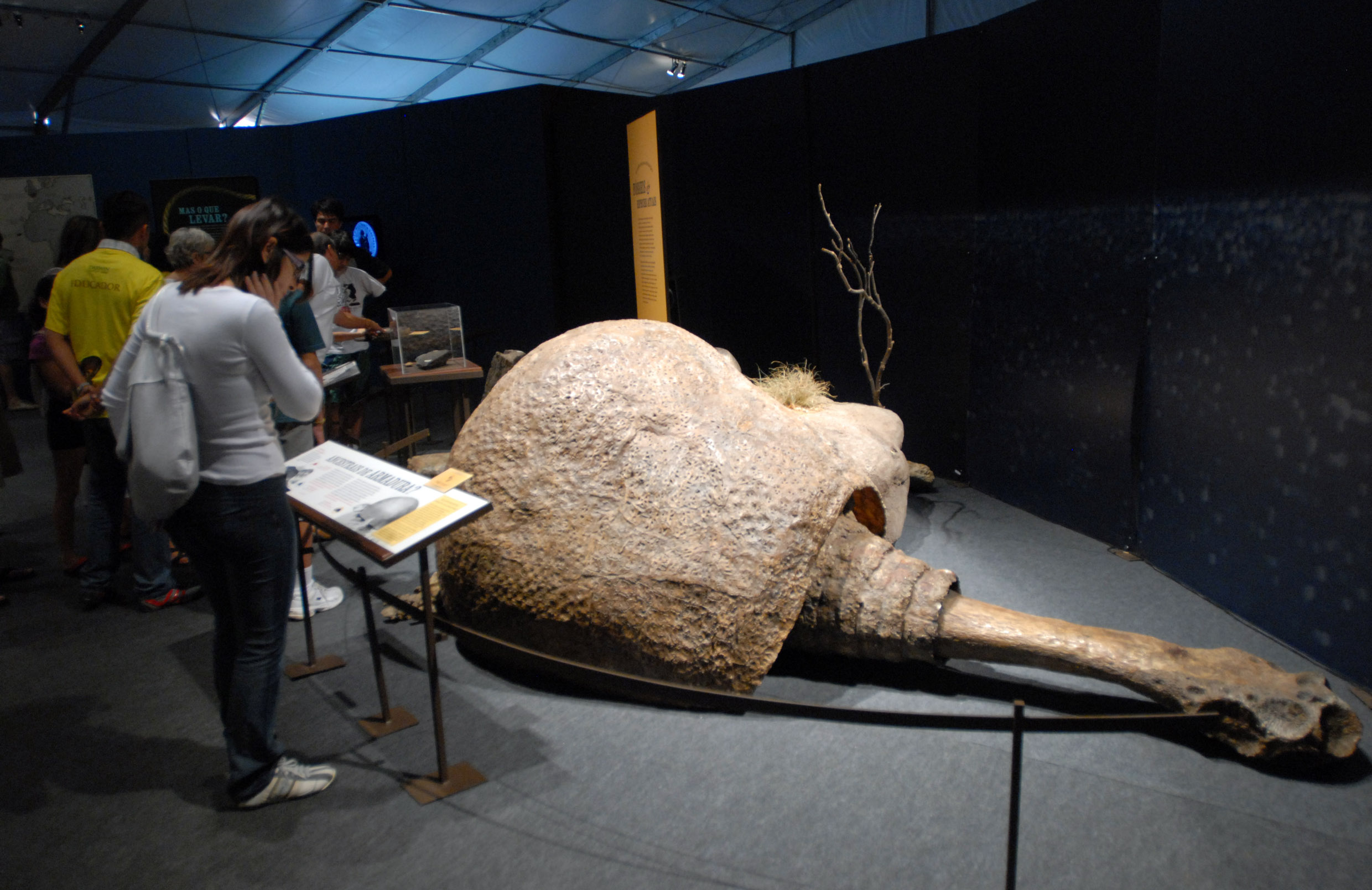 Exposição que marca os 200 anos do nascimento do naturalista Charles Darwin, na Esplanada dos Ministérios, em Brasília Doedicurus fossil.